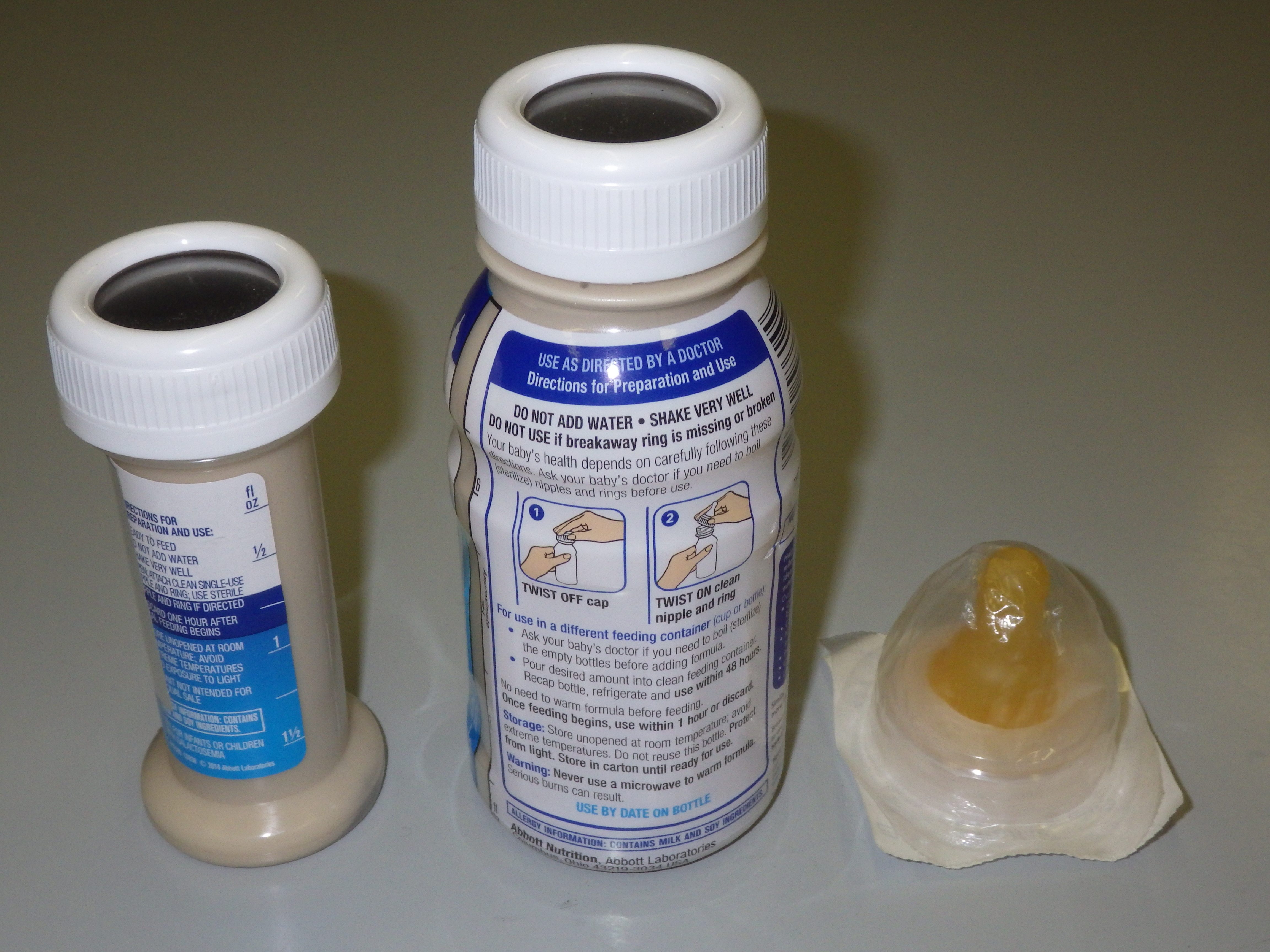 右：48mL 中：200mL 左：使い捨て専用ニップル